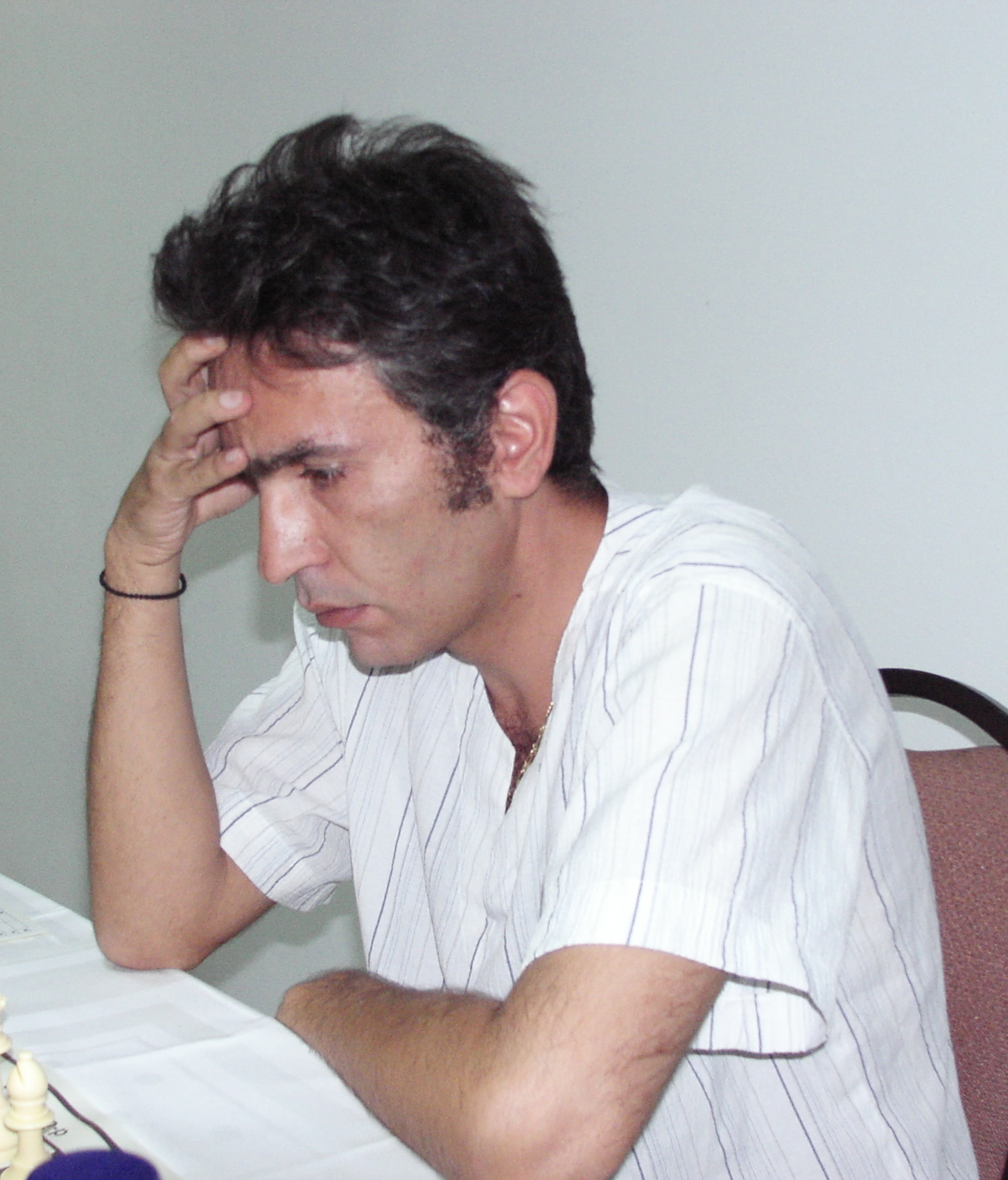 GM Ioannis Nikolaidis, Greece